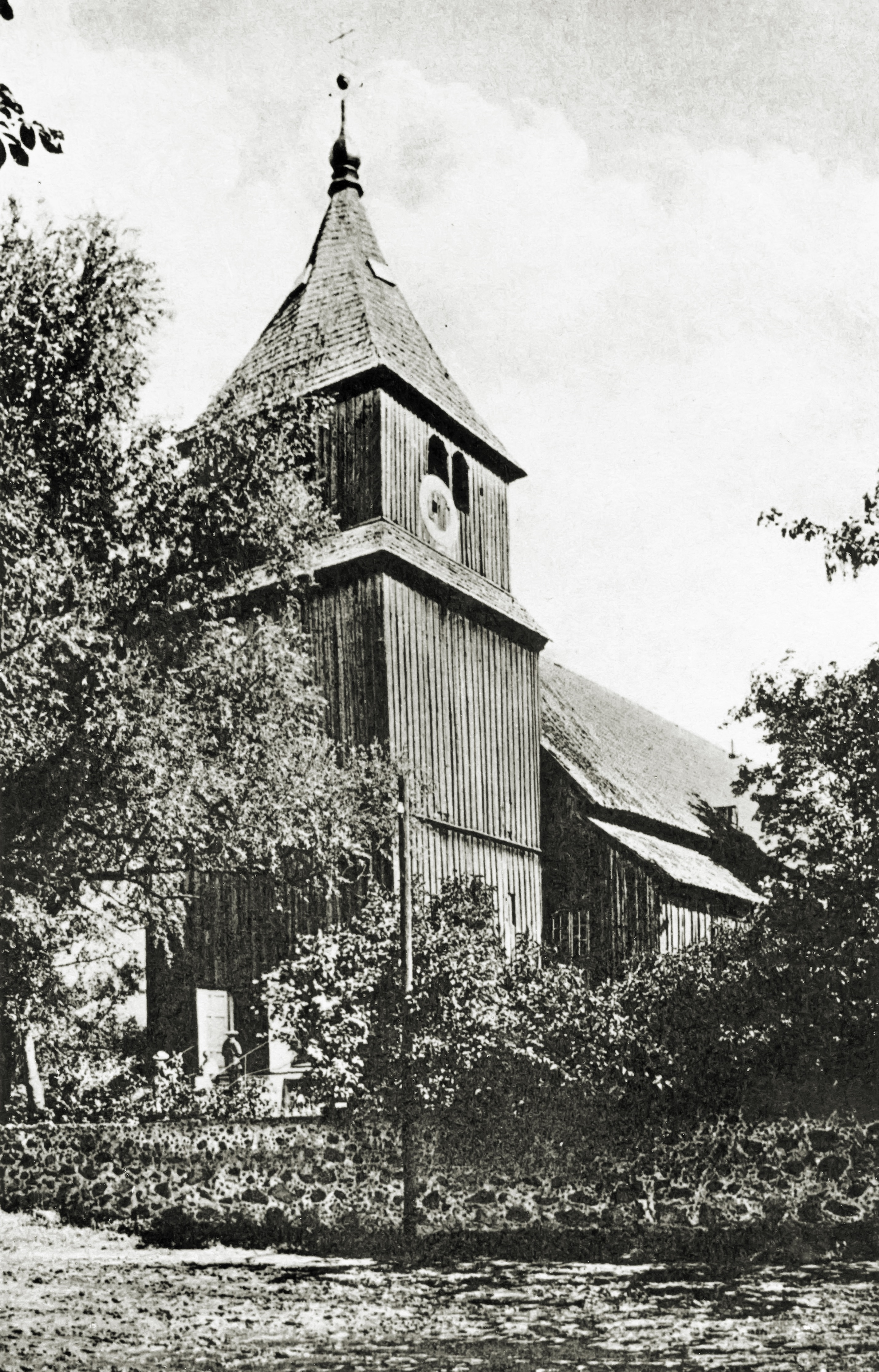 Kirche in Ostrokollen/Scharfenrade, Masuren